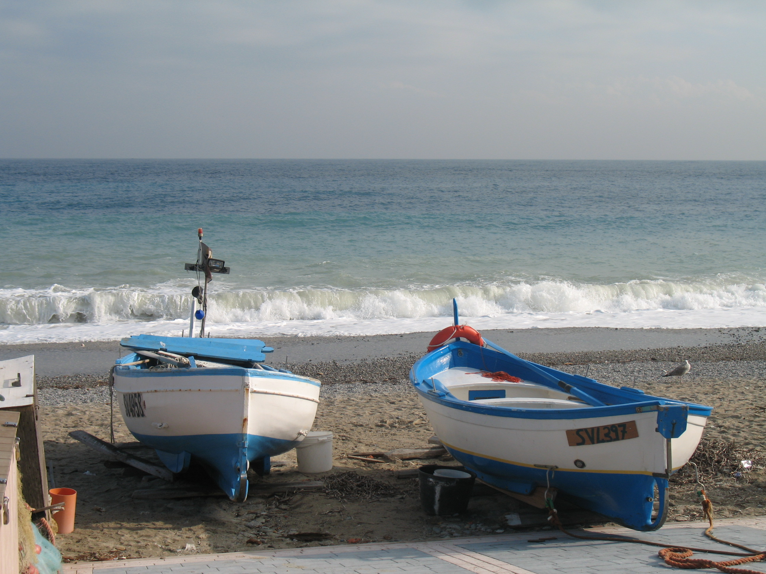 Serie di Immagini da Noli in provincia di Savona